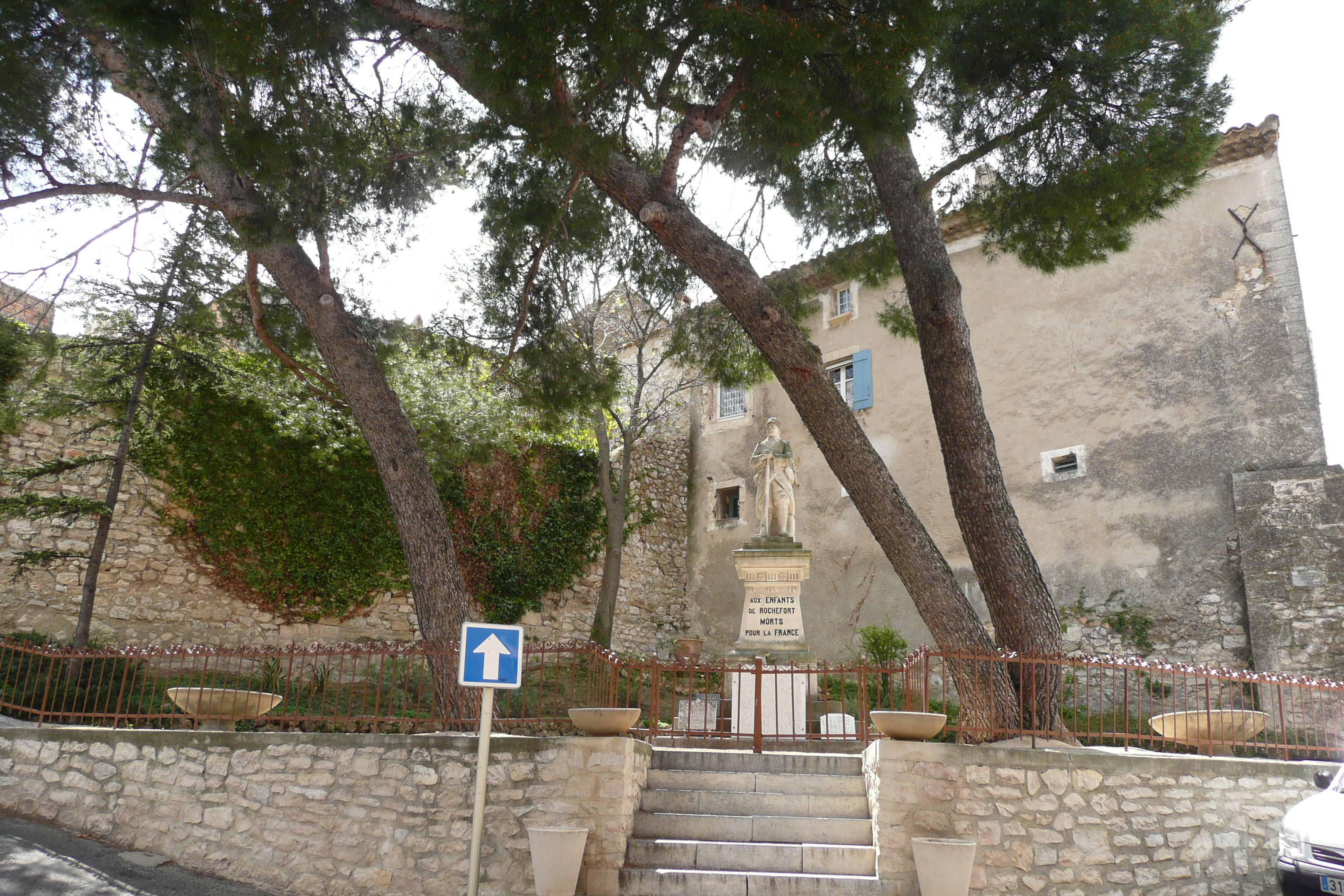 Jardin de Notre Dame de Grâce près de Rochefort-du-Gard.